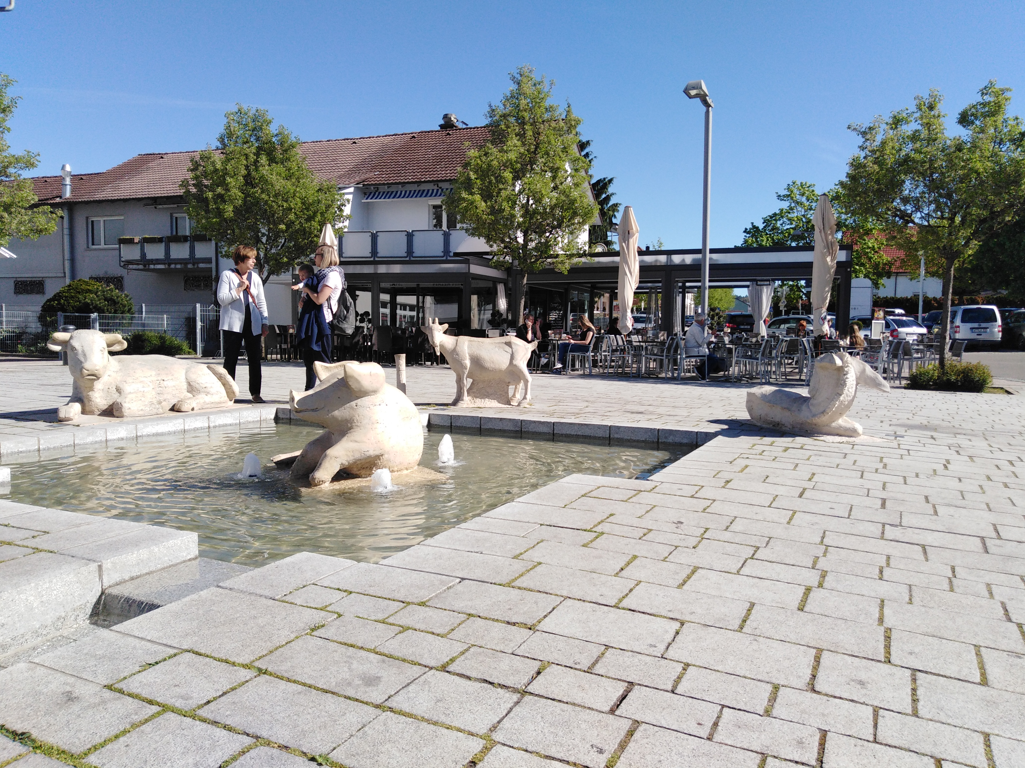 Lauchringen, Gemeinde im Landkreis Waldshut in Baden Württemberg. Marktplatz mit Tierbrunnen.